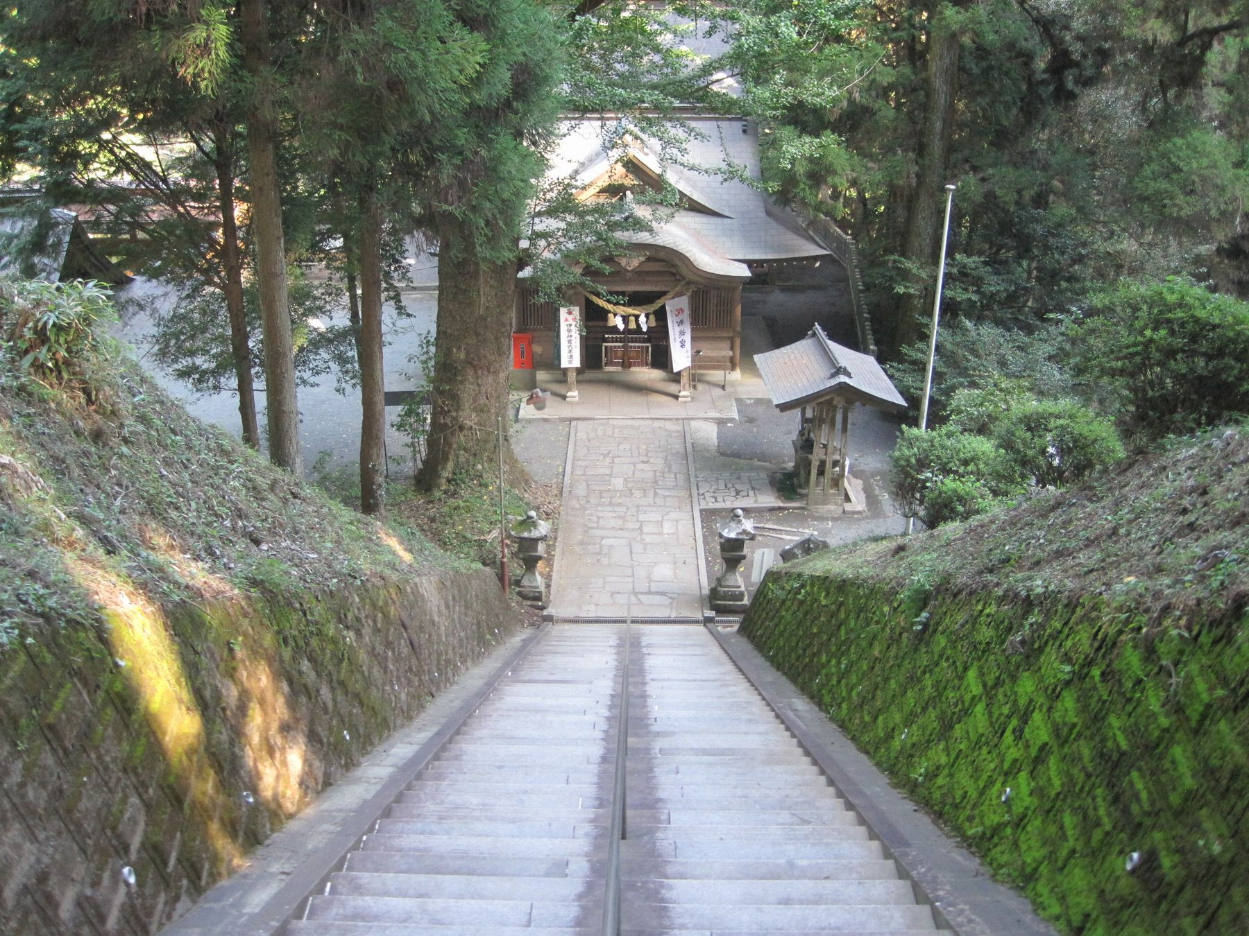 草部吉見神社